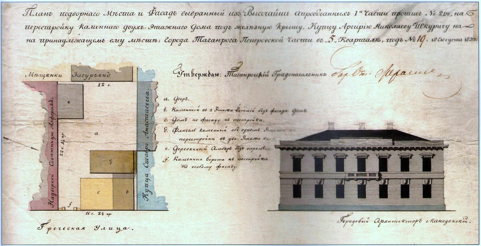 Греческая улица в Таганроге д. 63. Проект дома. 1832. Архитектор П. Македонский.